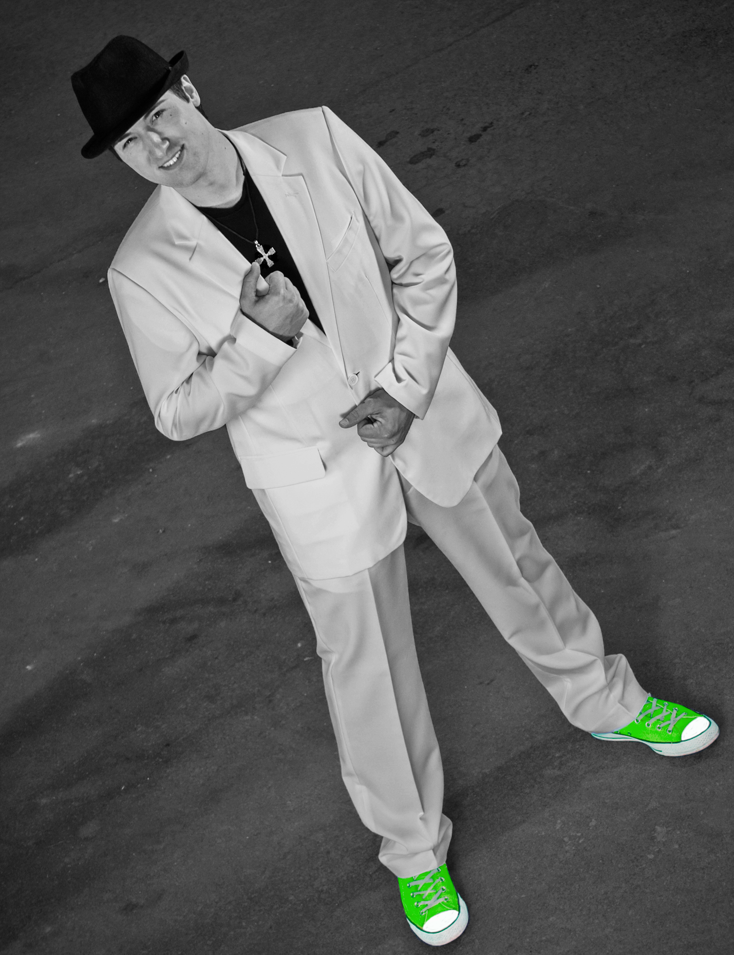 Zauberer und Moderator Mario Richter ist Unterhaltungskünstler und bekannt geworden als Radiosprecher und Magier. Sein Markenzeichen sind die giftgrünen Schuhe. Seiner Homepage nach ( um neue Wege in der Unterhaltungsbranche zu gehen.